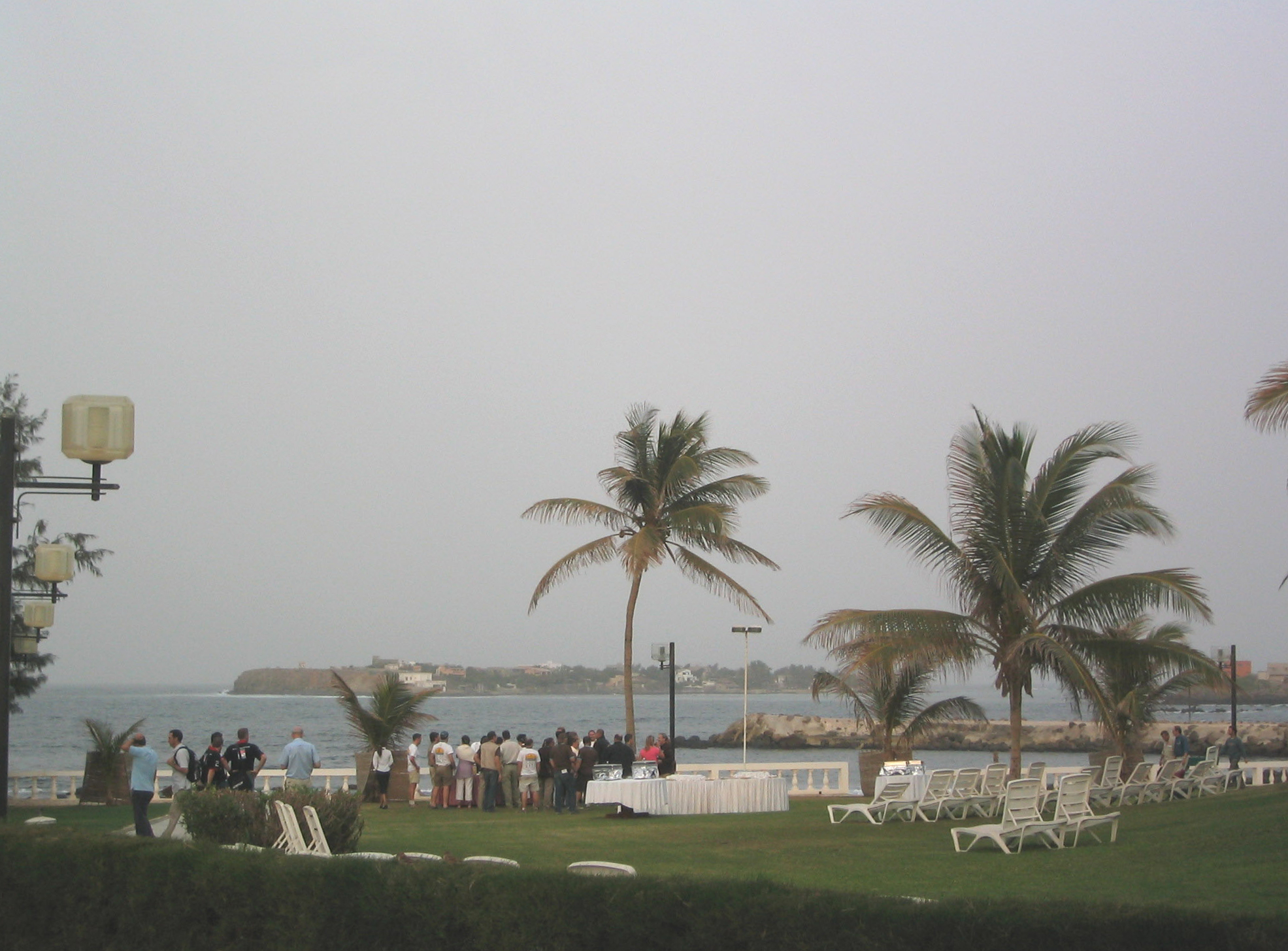 L'île de Ngor vue depuis les jardins de l'hôtel Le Méridien (pointe des Almadies, Dakar, Sénégal)